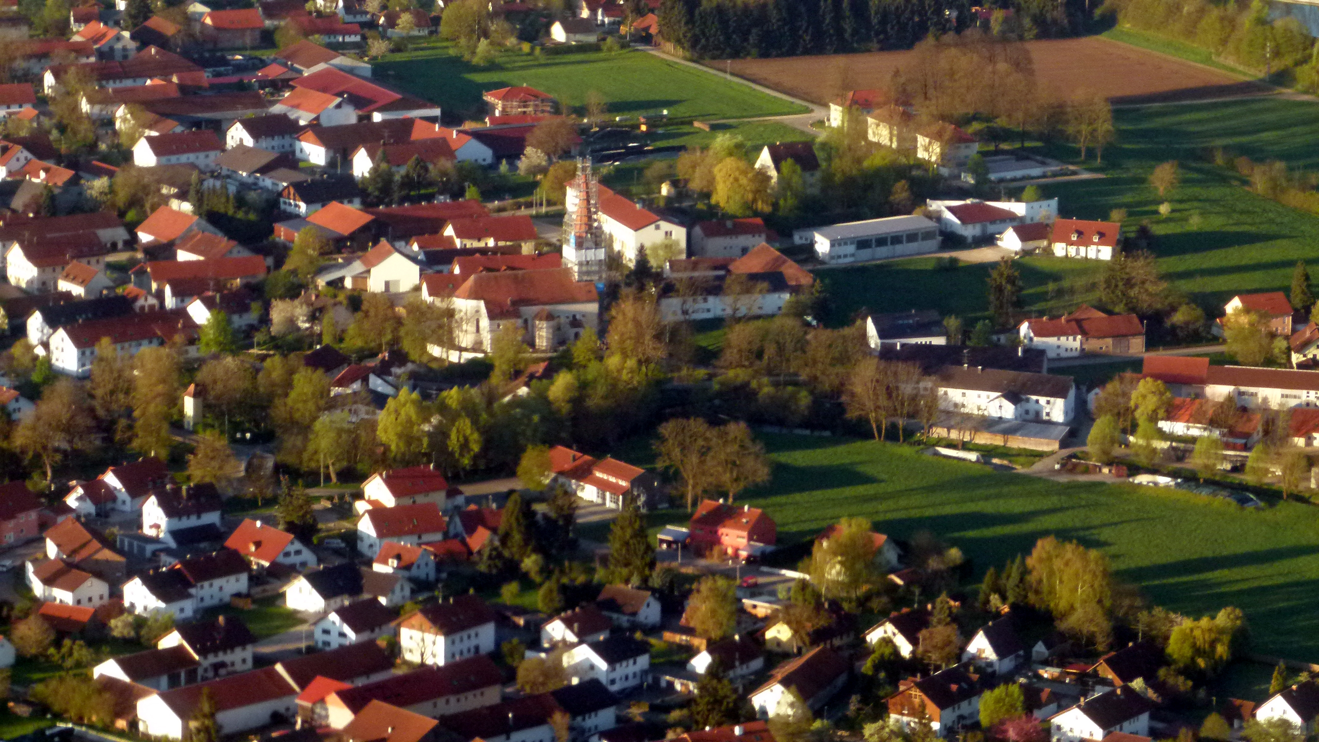 Luftbildaufnahme von der Gemeinde Eitting (Oberbayern)